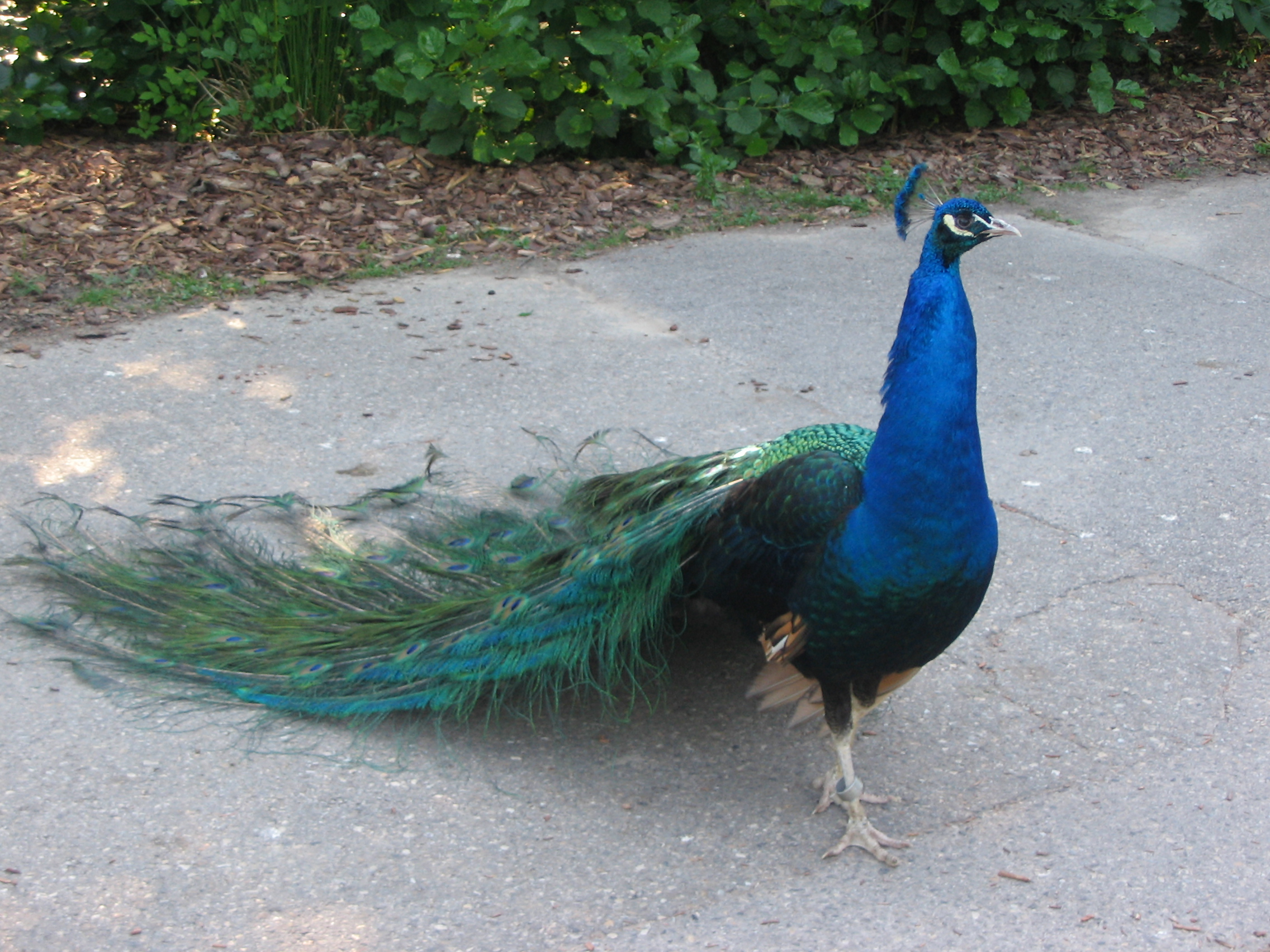 Paon